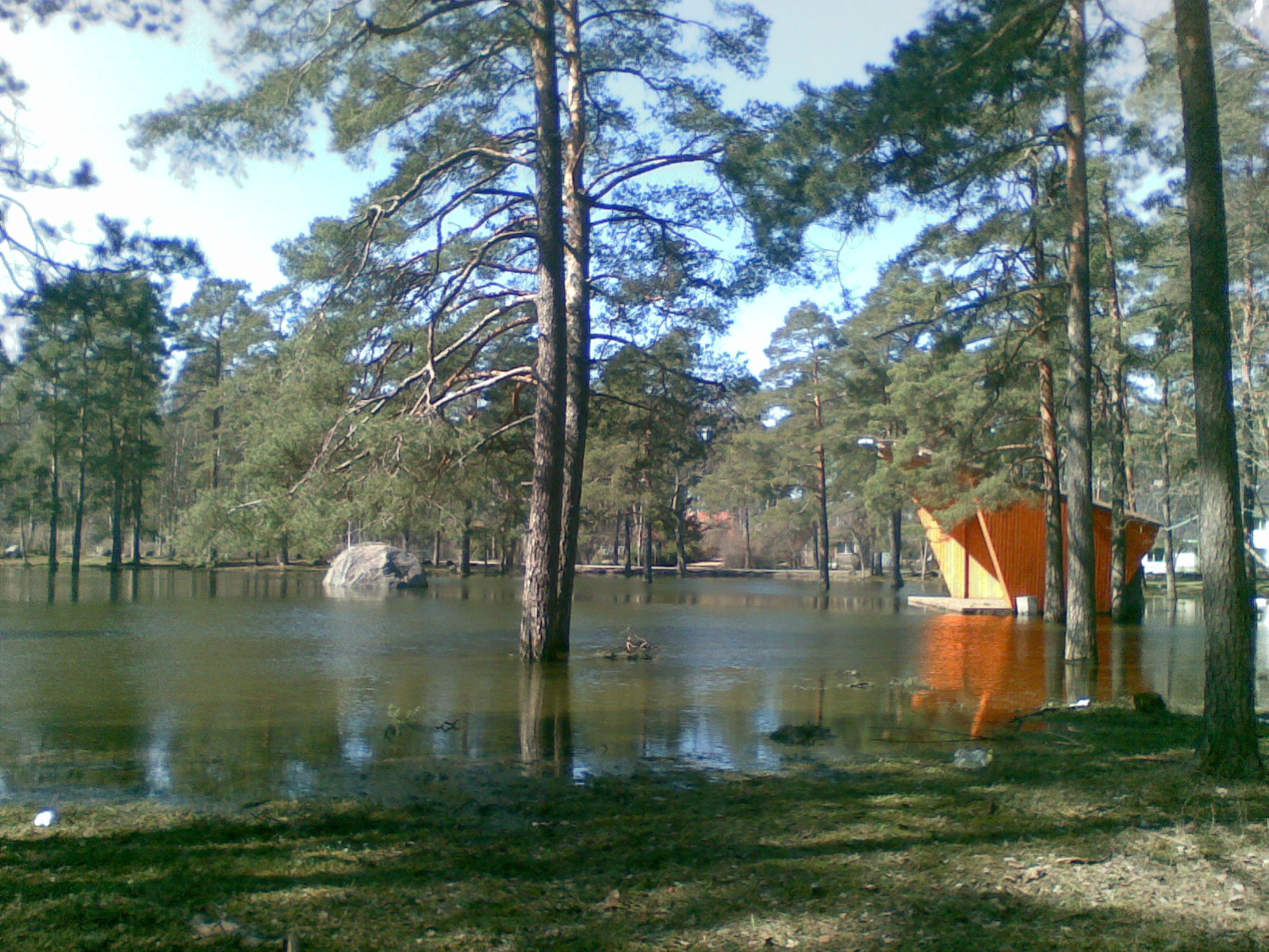 Aruküla lauluväljak. Üleujutatud. Vasemal rändrahn, paremal laulukaar.